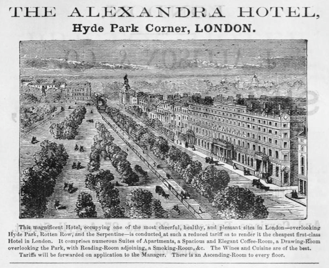 Hotel advertisement